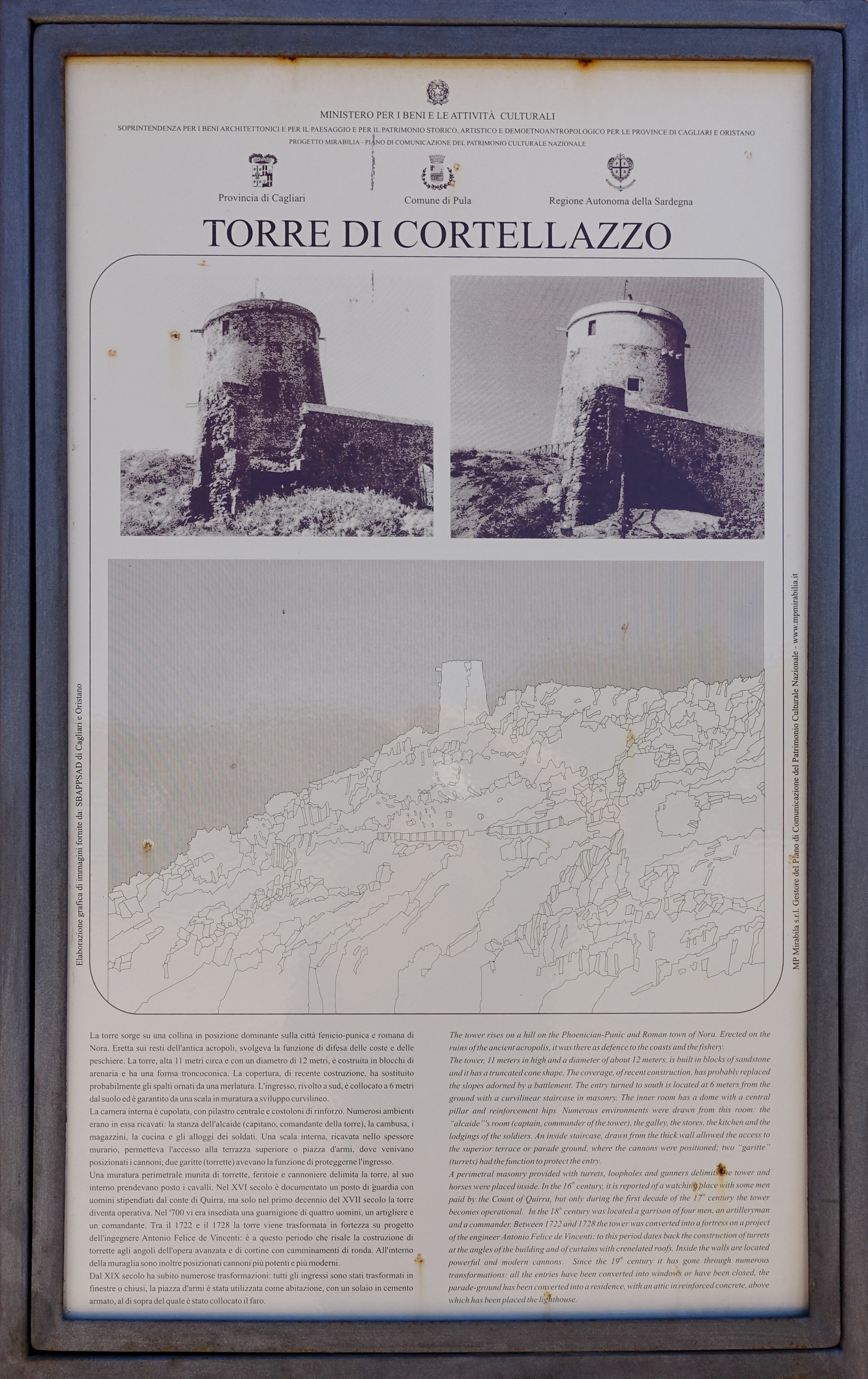 Informationstafel zum Torre del Coltellazzo oder Torre di Sant’Efisio bei Nora, Gemeinde Pula, Sardinien, Italien